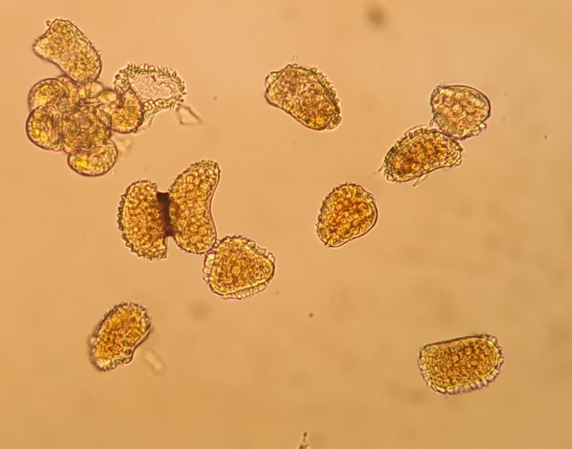 咖啡駝孢鏽菌的夏孢子，略呈腎形，具有半邊刺、半邊平滑的特徵。